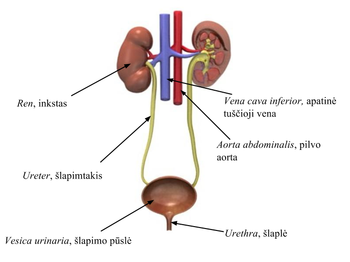 Šlapimo šalinimo sistema